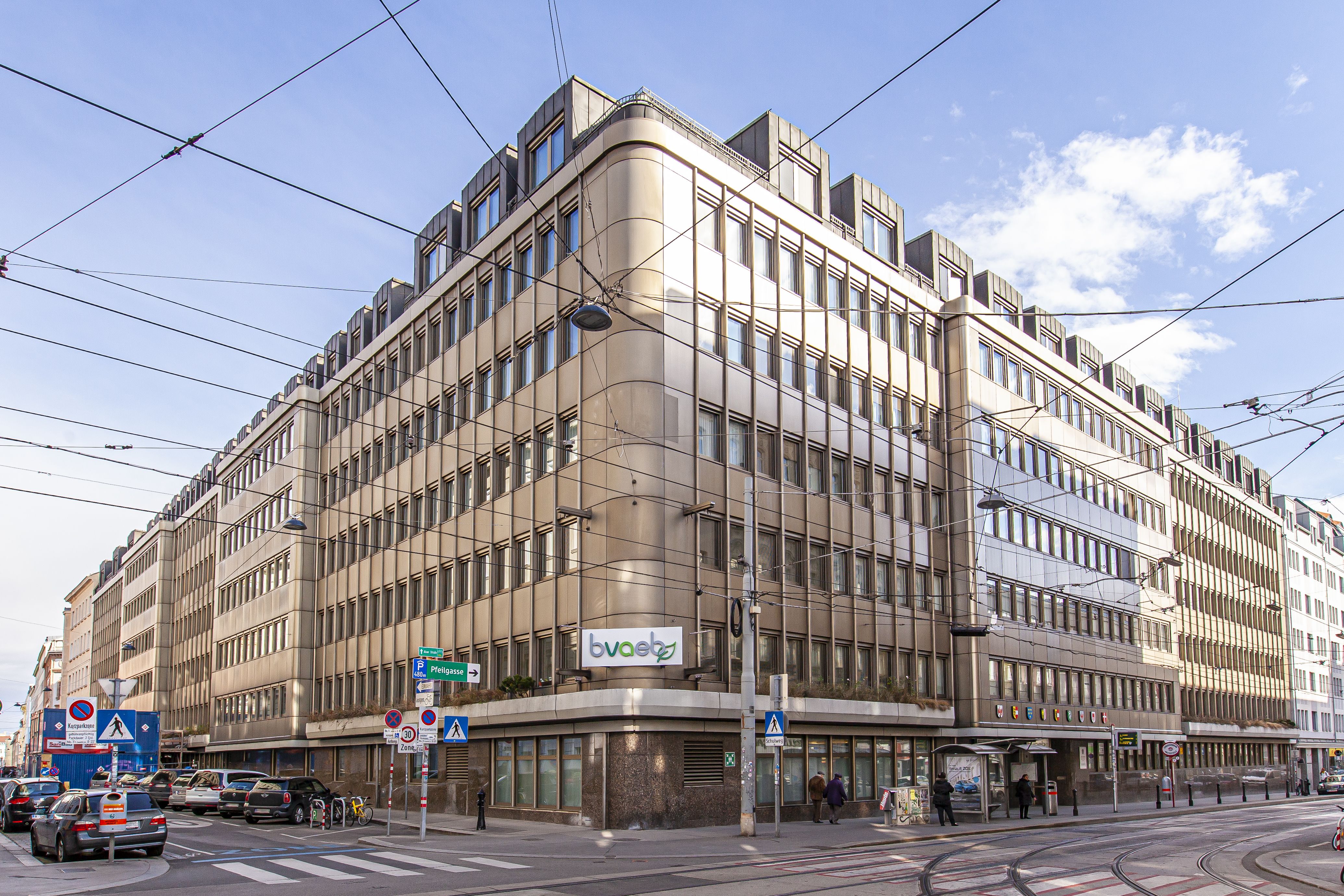 Gebäude